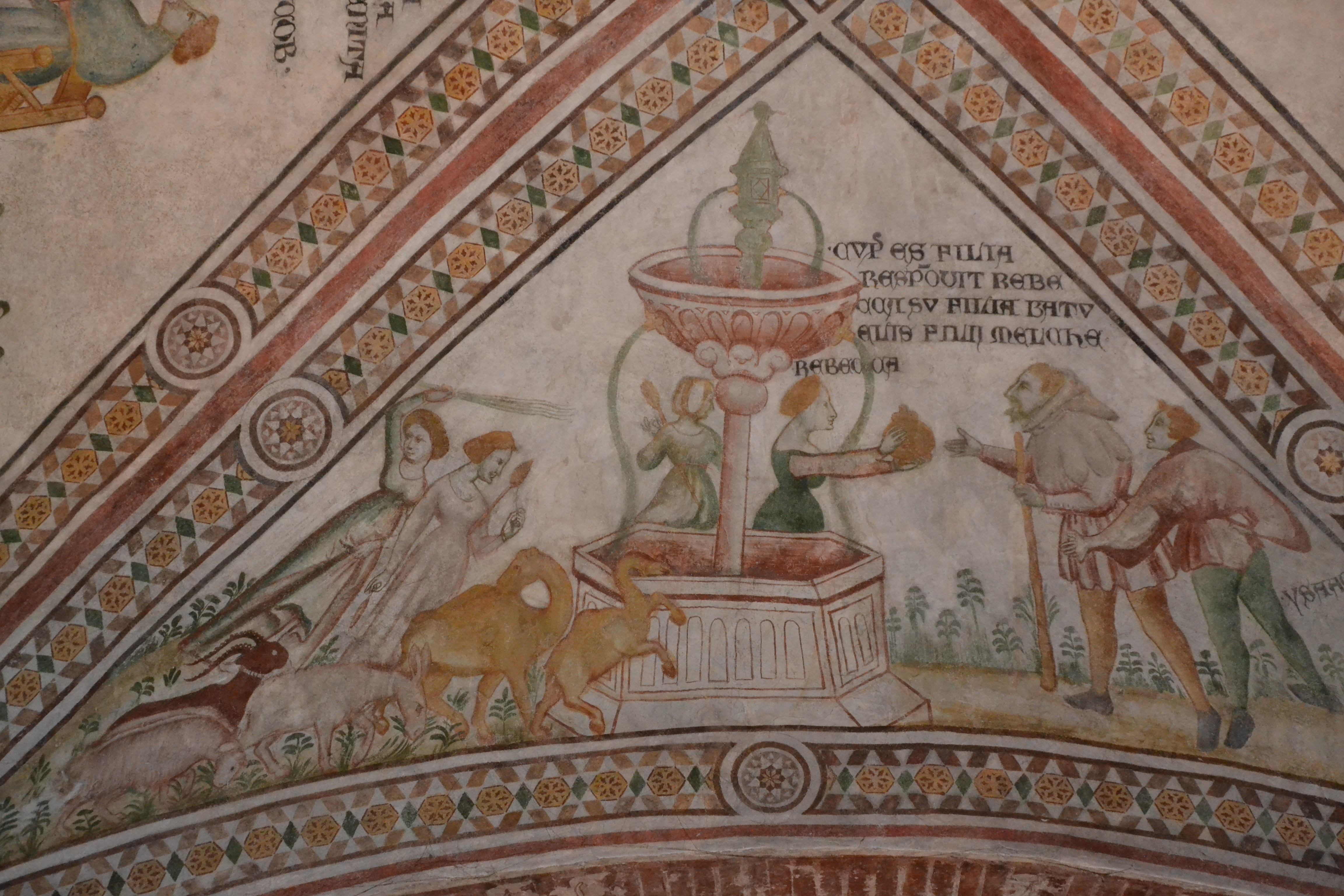 Duomo (Cremona) - affreschi della navata principale del XV secolo di anonimi maestri tardogotici